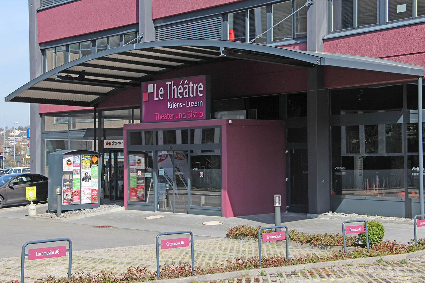 Der Haupteingang des Le Théâtre in der Luzerner Vorortsgemeinde Kriens.